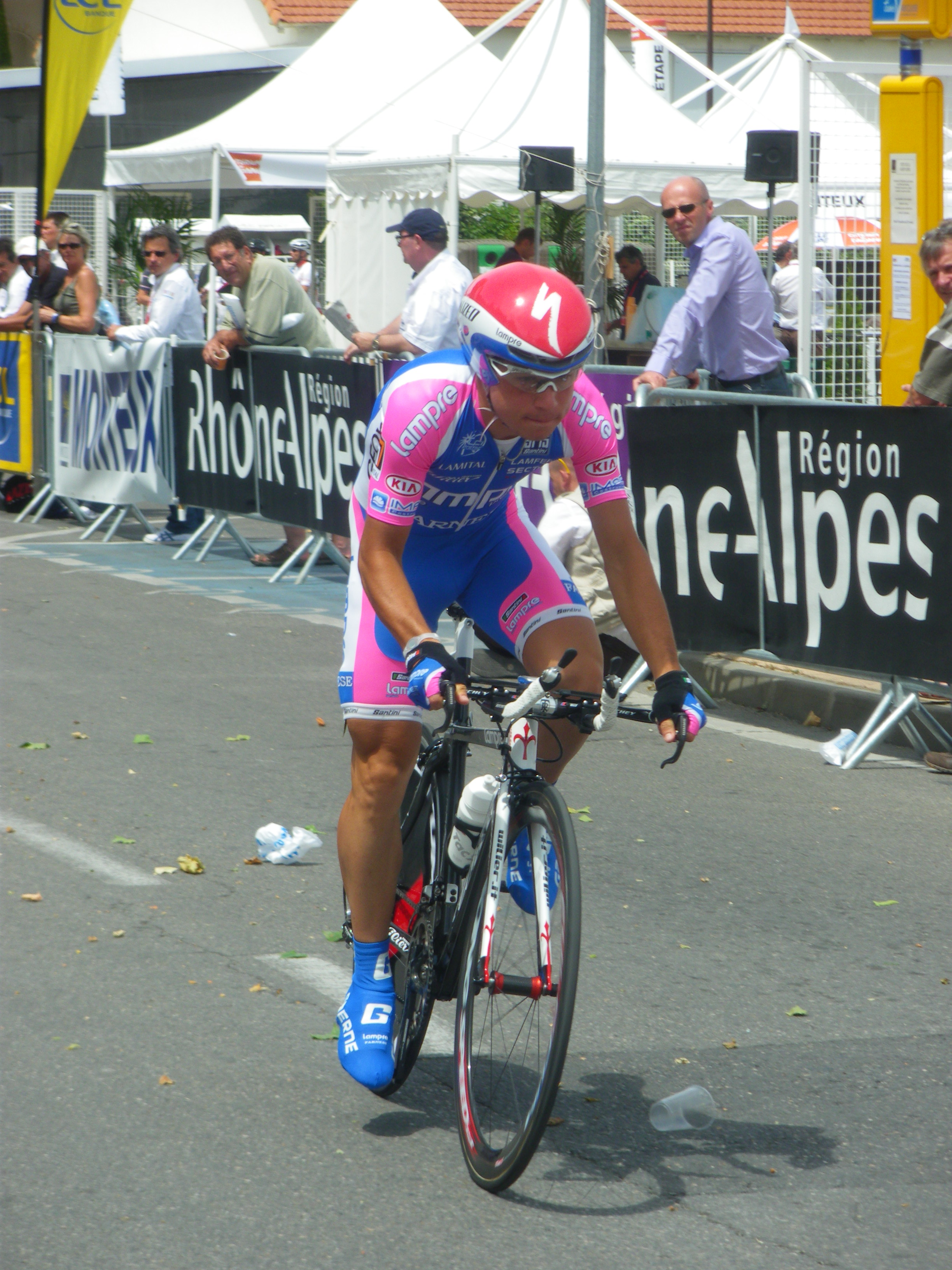 Enrico Magazzini au départ de la 3ème étape du critérium du Dauphiné Libéré 2010 (Monteux - Sorgues)